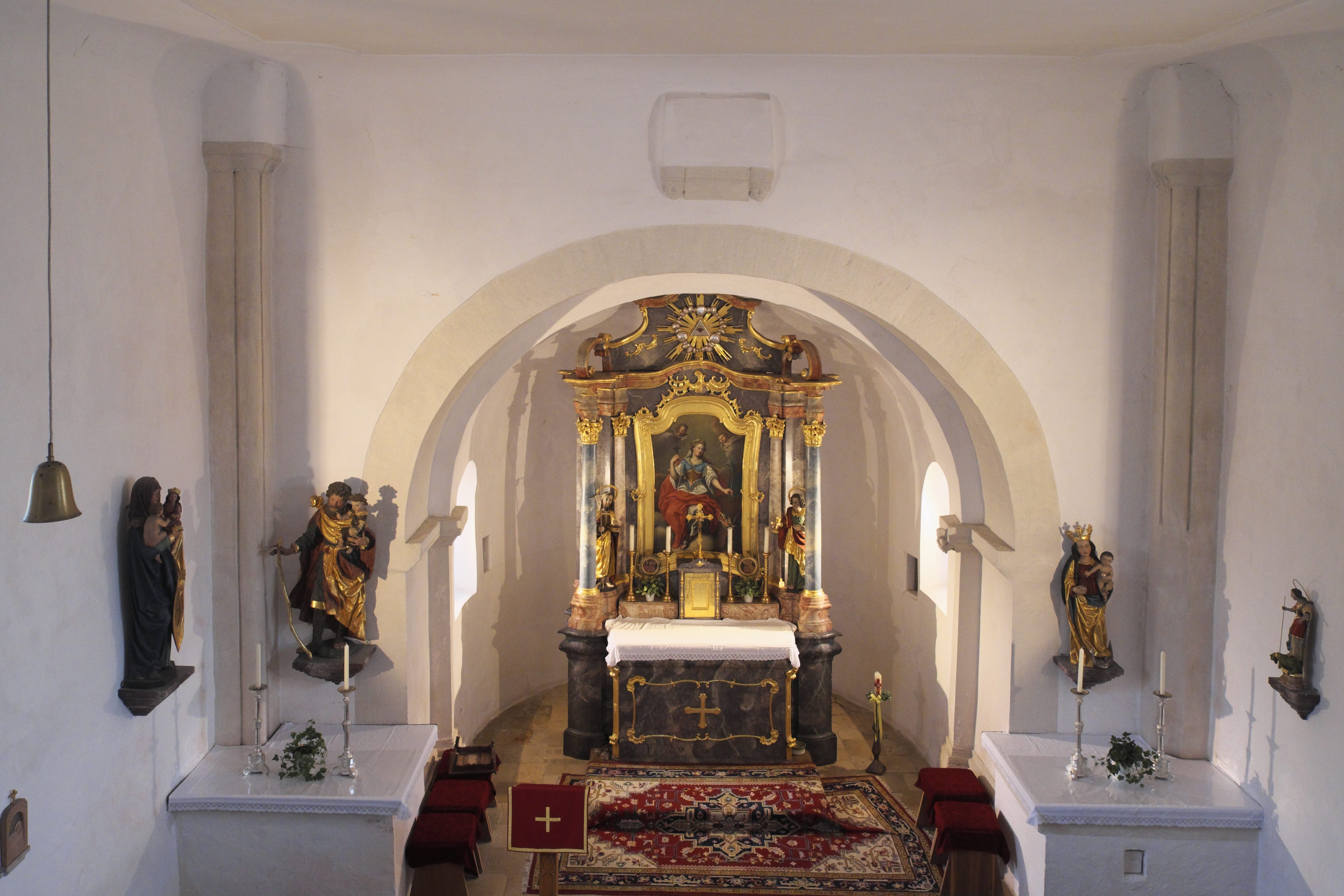 Katholische Filialkirche St. Margareta in Weißendorf (Oberdolling) im oberbayerischen Landkreis Eichstätt (Bayern/Deutschland), Innenraum